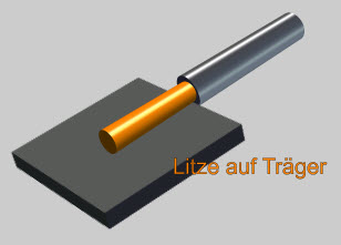 Litze auf Träger